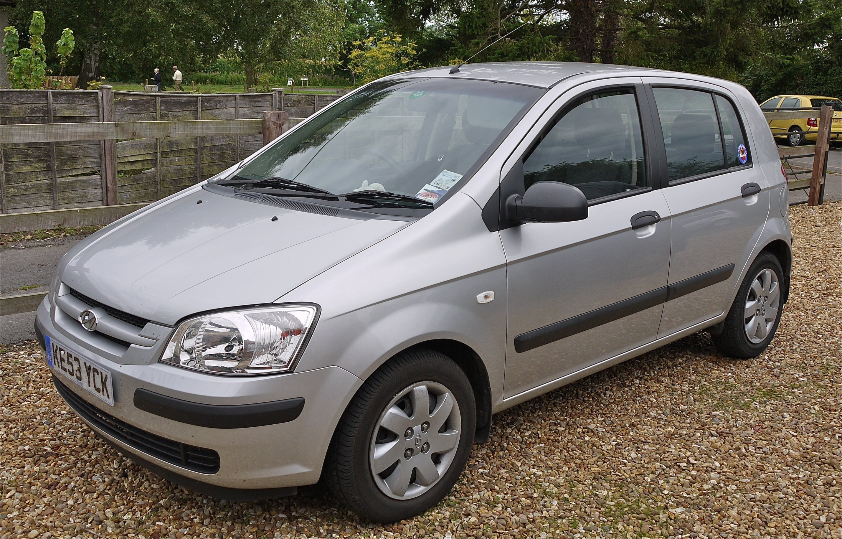 Panasonic G1 14-45 Lens